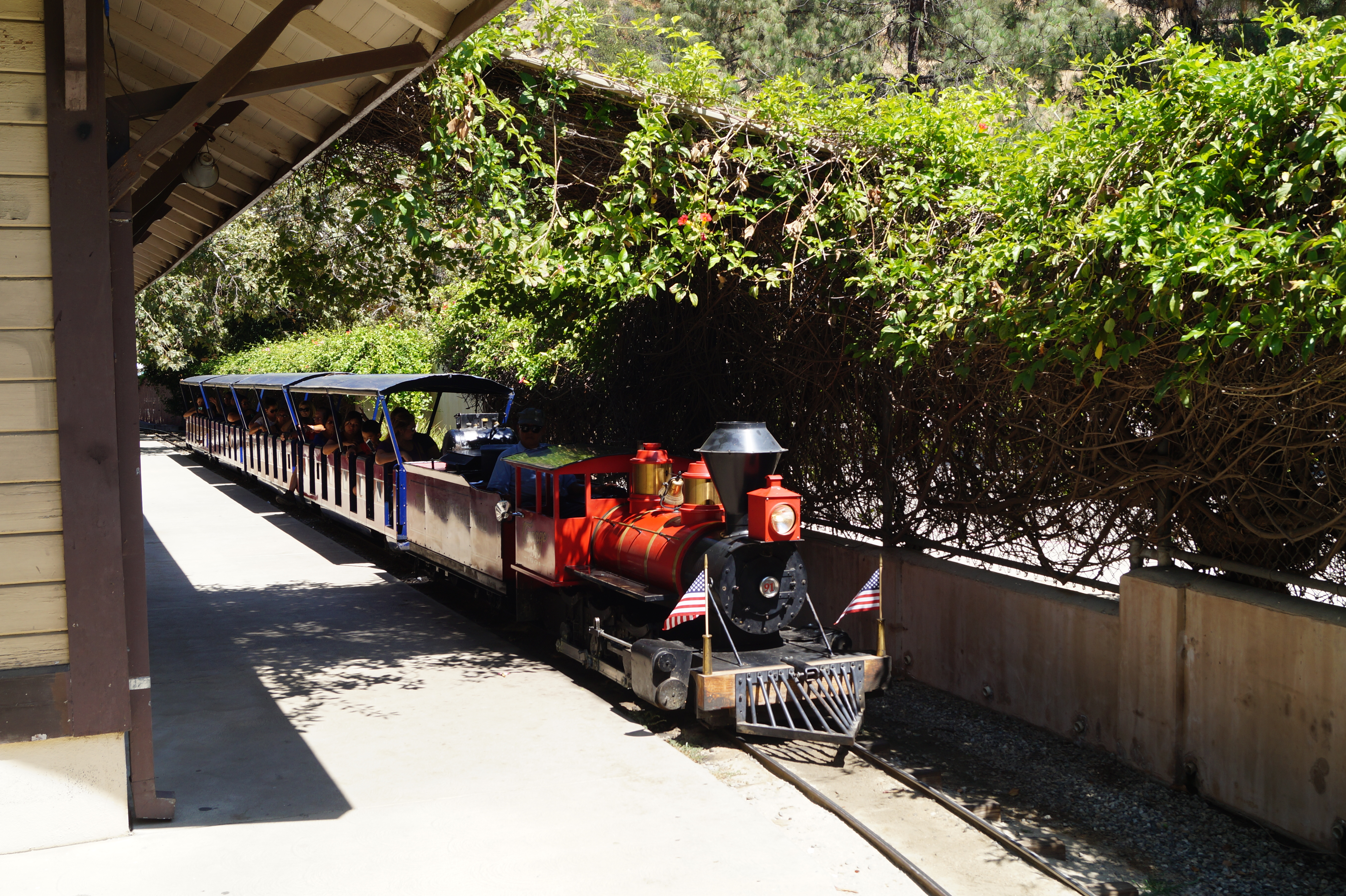 Travel Town Museum is a transport museum dedicated in the northwest corner of Los Angeles, California's Griffith Park. The history of railroad transportation in the western United States from 1880 to the 1930s is the primary focus of the museum's collection, with an emphasis on railroading in Southern California and the Los Angeles area.